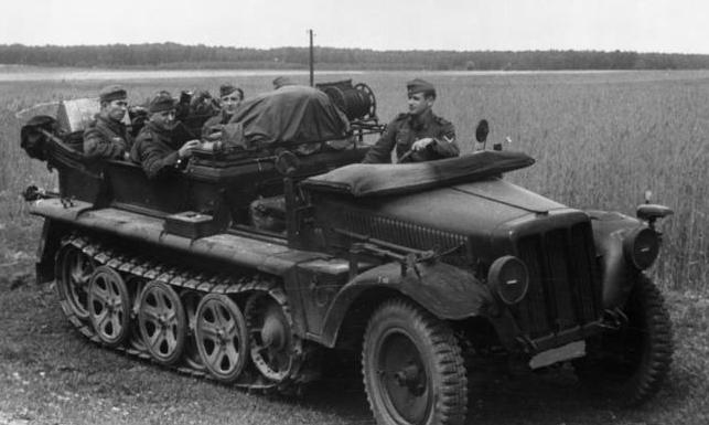 Russland, Kettenfahrzeug Scherl Bilderdienst An der Sowjetfront: Auch aus den Seitenstrassen quellen die Kolonnen heraus und finden ihren Platz auf der Hauptvormarschstrasse trotz aller Überfüllung. PK-Wiebe, Juni 1941 6232-41 [Sowjetunion, 1 to-Zugmaschine, ausgerüstet zur Verlegung von Fernsprechkabeln]